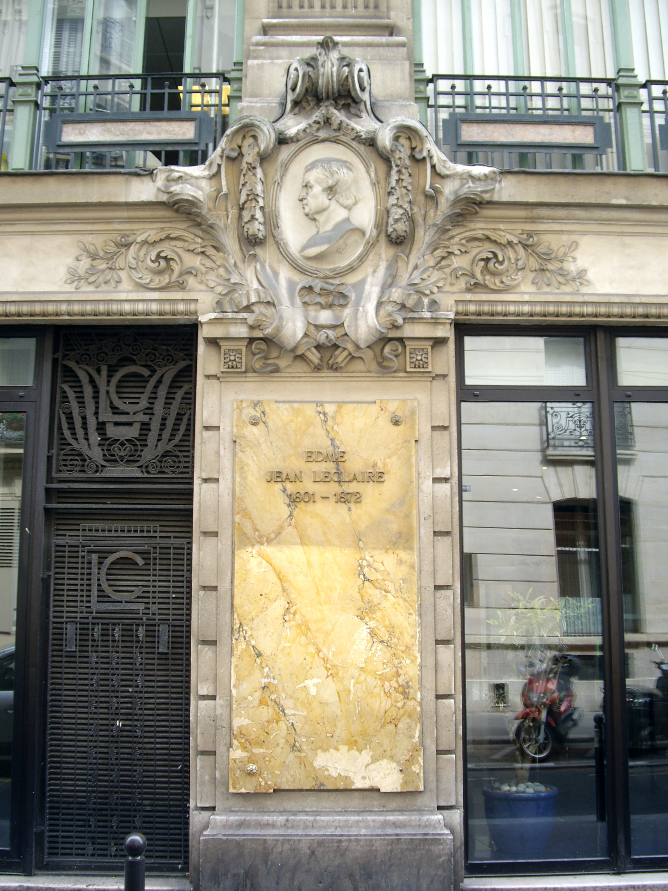 Plaque commémorative au siège de la Société de prévoyance et de secours mutuels des ouvriers & employés de la maison Leclaire, 25 rue Bleue, Paris 9e, avec un buste d'Edme-Jean Leclaire (1801-1872).